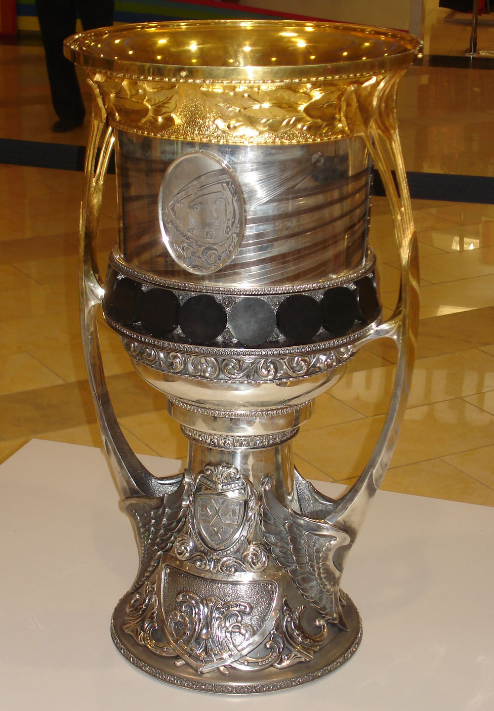 Кубок Гагарина на обозрении в Казани